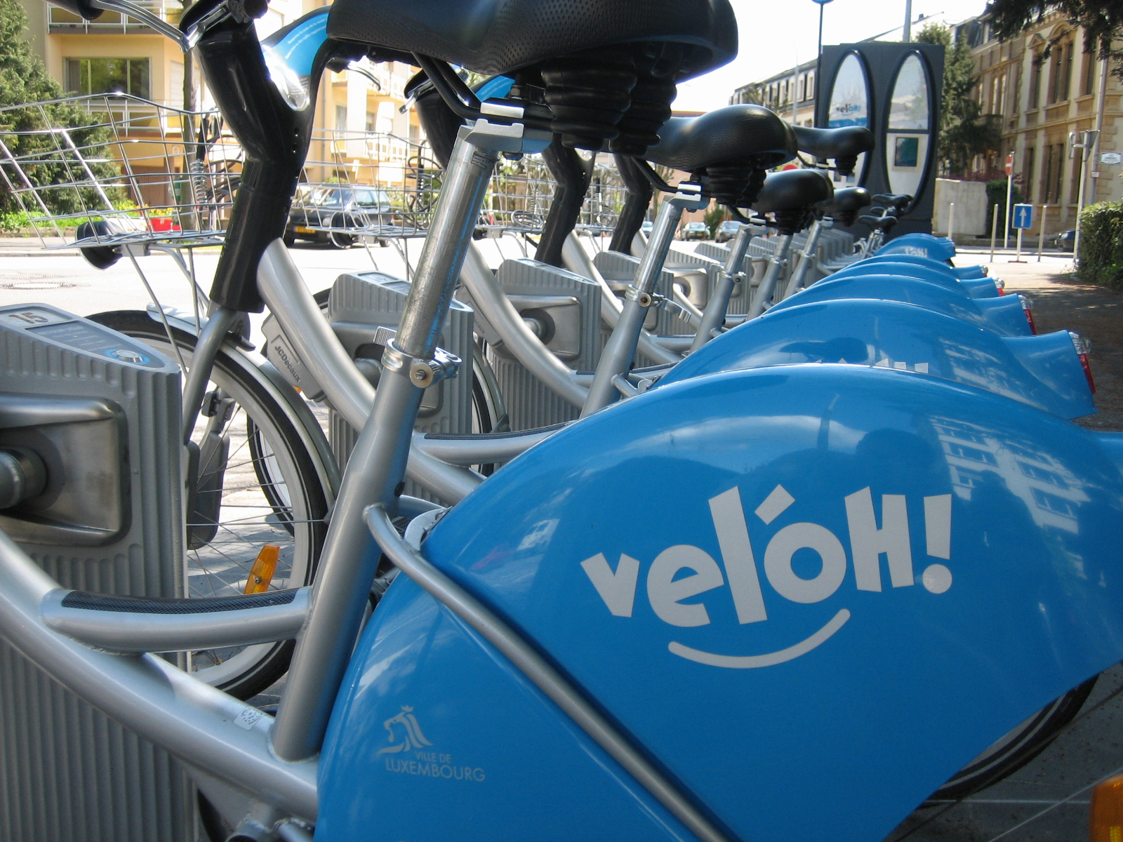 Eng Statioun vun de "vel'oh!"-Lounvëloen an der Stad Lëtzebuerg, Mee 2008.